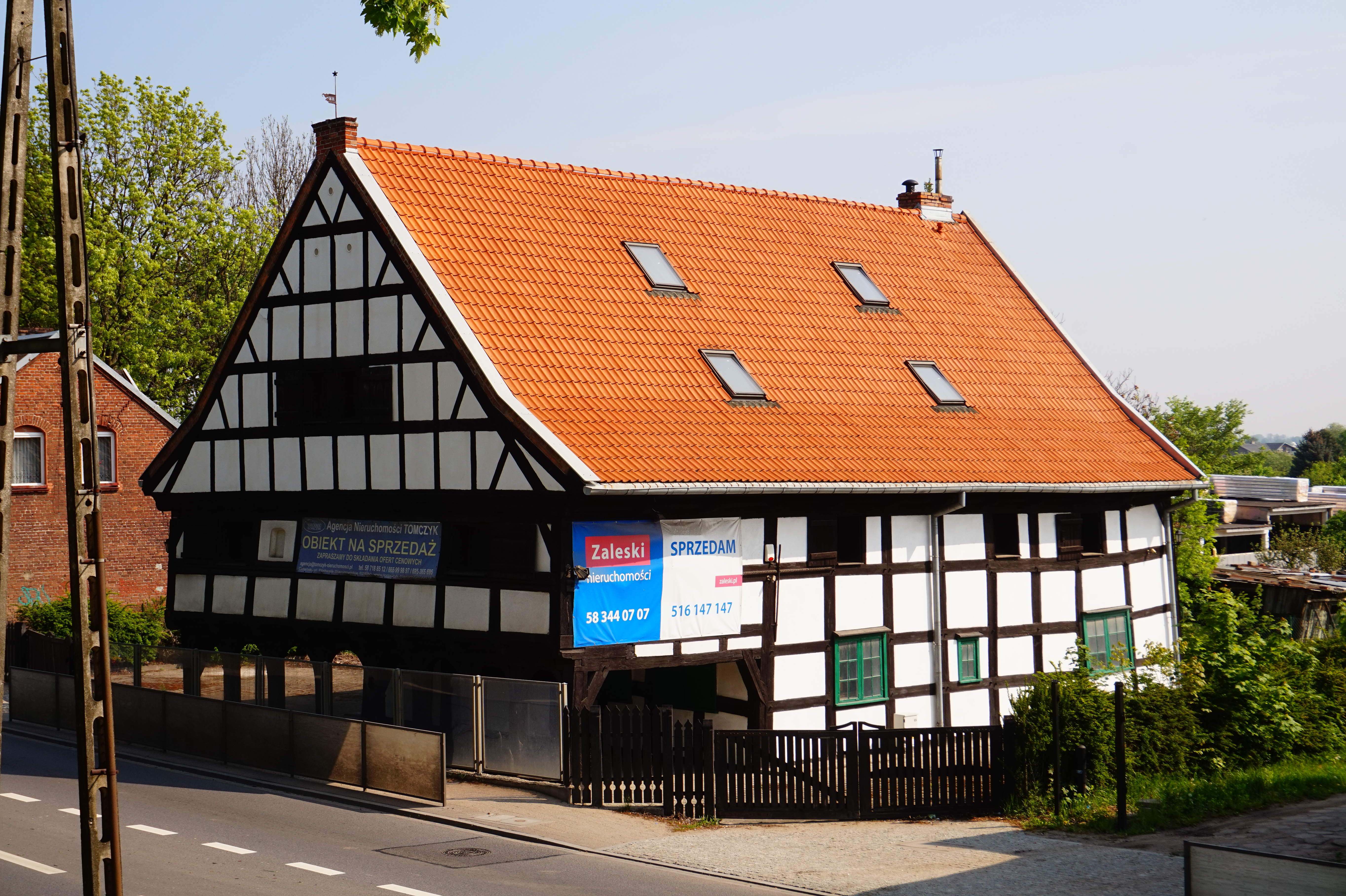 Gdańsk Orunia - stary dom